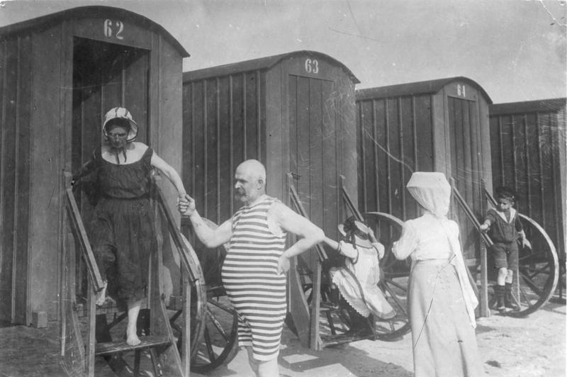 So badete man damals! Immer galant! Norderney 1910.